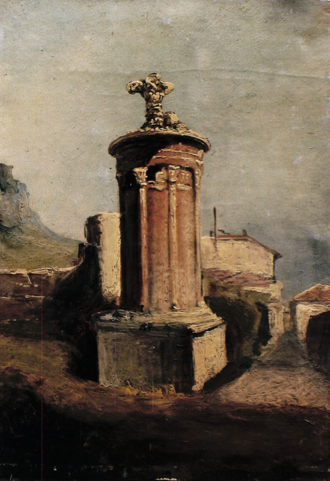 Gheorghe Tattarescu - Turnul lui Lysicrate - Compoziţie miniaturală reprezentând turnul lui Lysicrate, bine conturat ca stil arhitectonic (turn cilindrinc cu baza pătrată), Muzeul Memorial "Gh. M. Tattarescu", 16x11,6 cm.